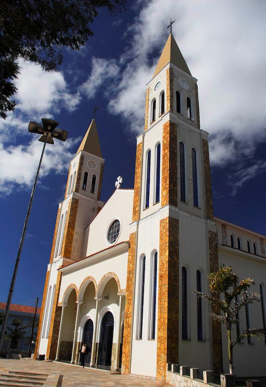 Catedral Imaculada Conceição - Diocese de Formosa